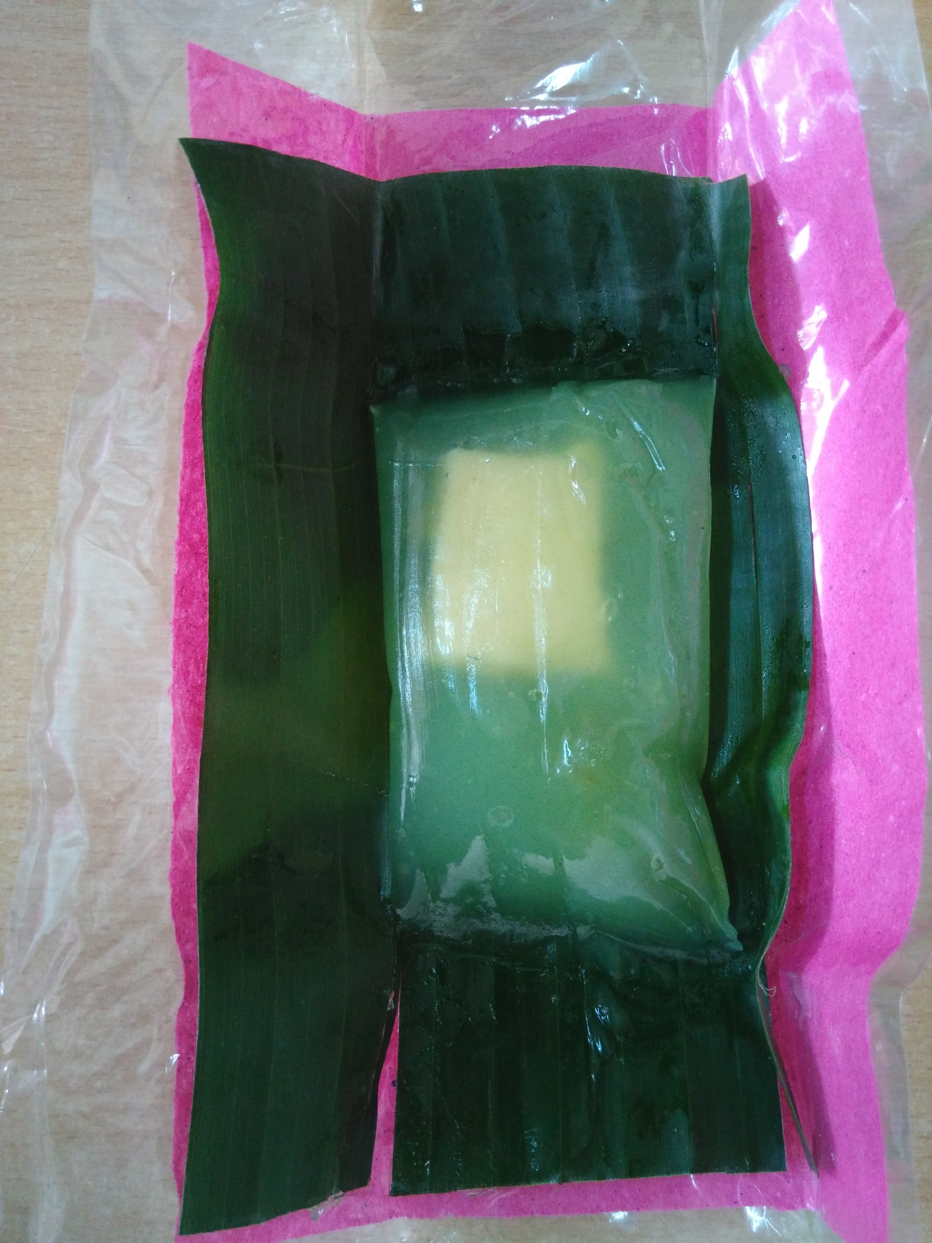 Hình chụp bằng điện thoại di động của cá nhân về một cái bánh nậm Thủ Đức